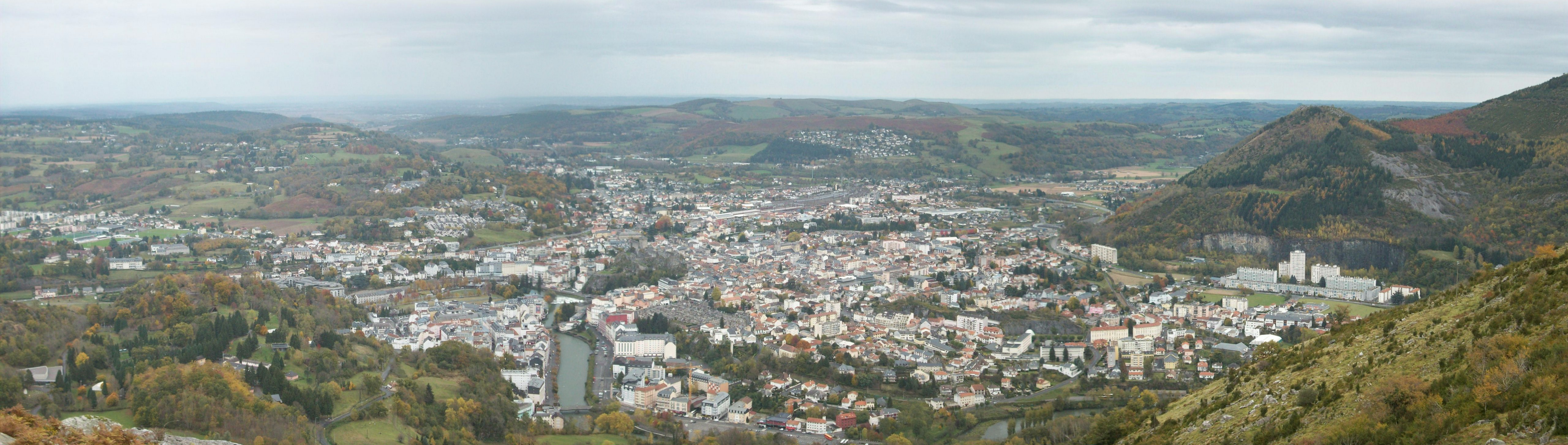 Lourdes vue du Béout (Hautes-Pyrénées, France). A droite, on reconnaît le Petit Jer et les anciennes carrières de l'Ophite, aujourd'hui occupées par la cité de même nom. Au delà, à droite, l'ouverture sur la plaine de Lézignan, en direction de Bagnères de Bigorre. Fermant la cuvette, au nord, les collines morainiques des landes de Sarsan et le lotissement de la Serre de Sarsan qui s'étage sur un versant, puis l'ouverture vers Saux, Adé, en direction de Tarbes. A l'ouest, les collines de Bartres puis l'ouverture sur la route de Pau où le stade Antoine Béguere est identifiable. Au premier plan à gauche, le domaine de la Grotte.